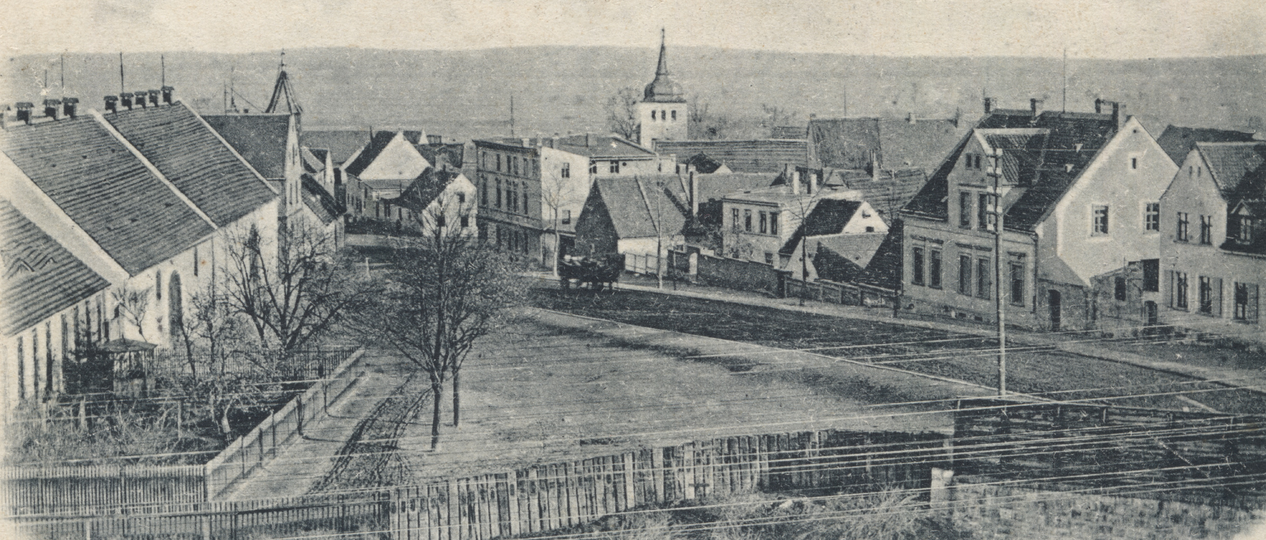 Blick von Westen auf die Sohlener Straße in Westerhüsen, Aufnahme vermutlich schon in den 1890ern